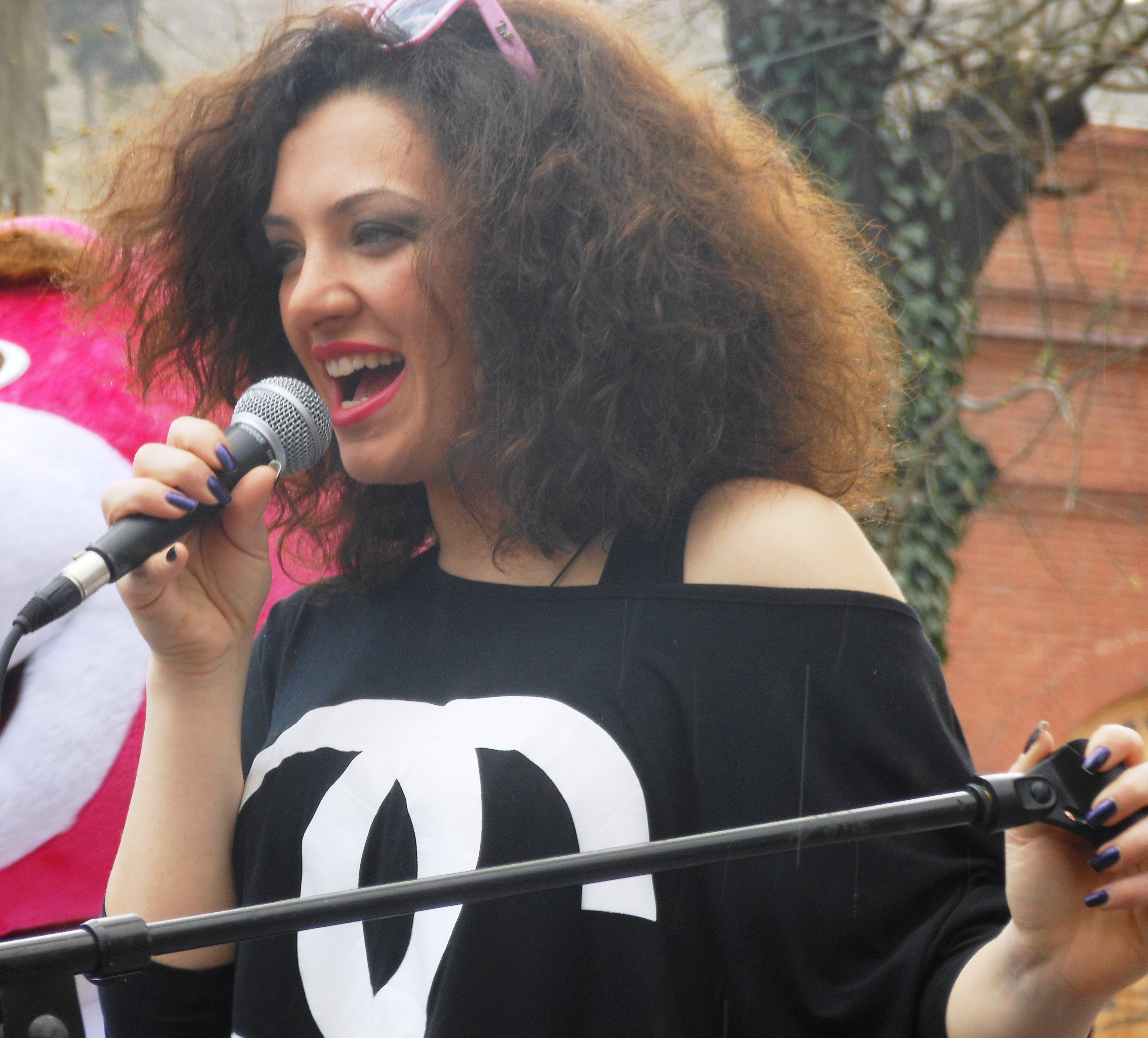 ნინი შერმადინი აქციაზე "ჩვენ ერთი სახლი ვართ"